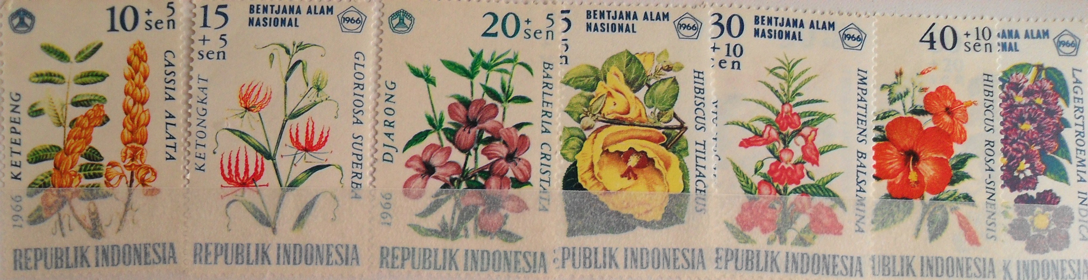 1966 yılına ait endonezya cumhuriyeti pulu.